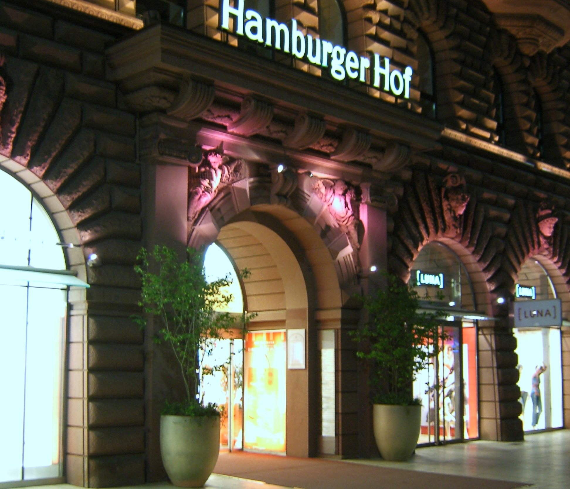 Der Hamburger Hof am Jungfernstieg in der Hamburger Neustadt wurde 1881 bis 1883 nach Plänen von Hanssen & Meerwein als Luxushotel erbaut. 1976 bis 1979 wurde das Gebäude zur Ladenpassage umgebaut. Die Plastiken stammen von Engelbert Peiffer.